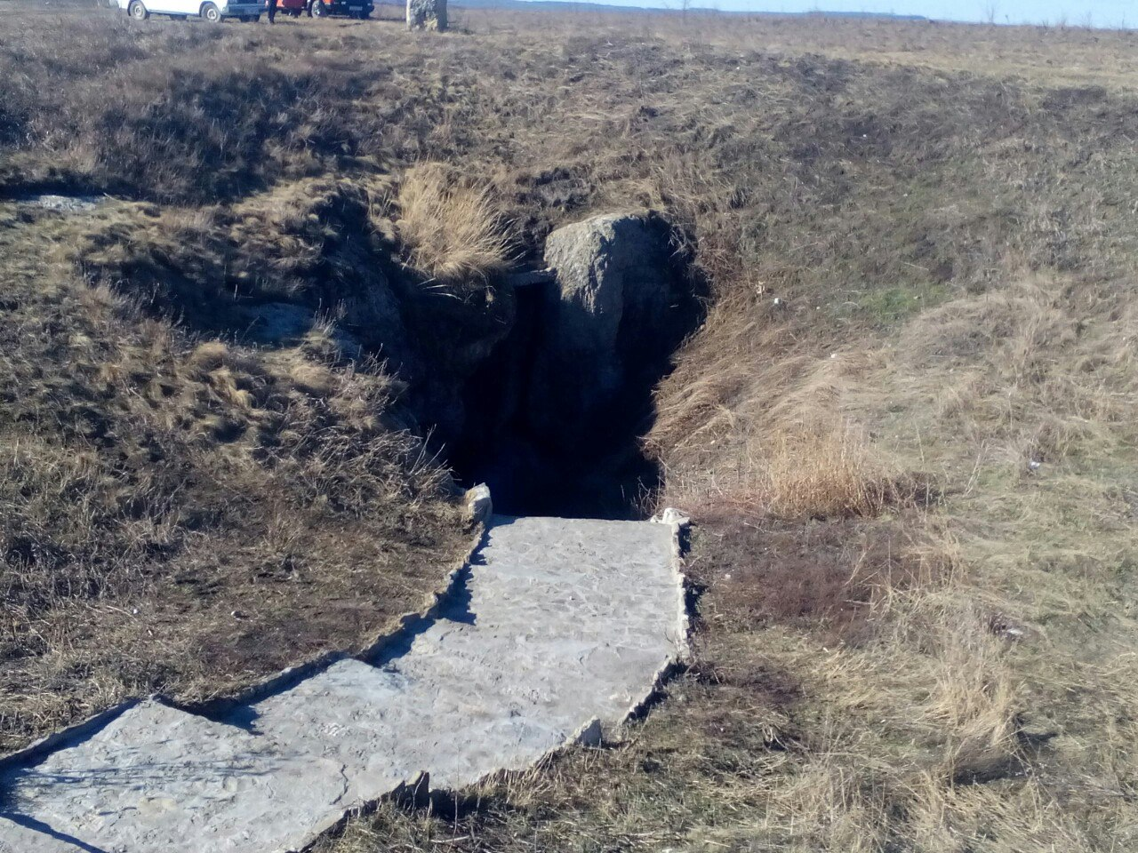 Печера «Вертеба», Борщівський район, с. Більче-Золоте, 2 км на пн.-зх. від села